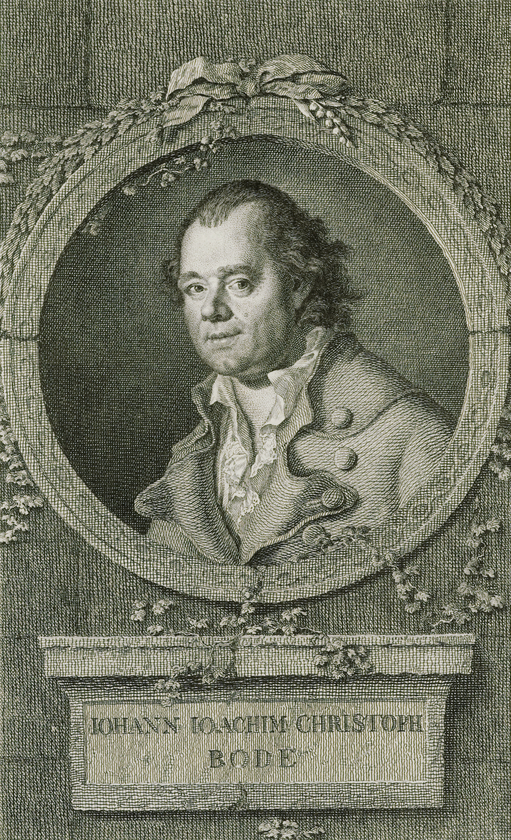 Iohann Ioachim Christoph Bode